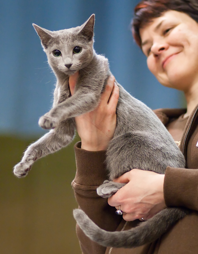 Jeune bleu russe présenté en exposition féline de Kotka en 2009.